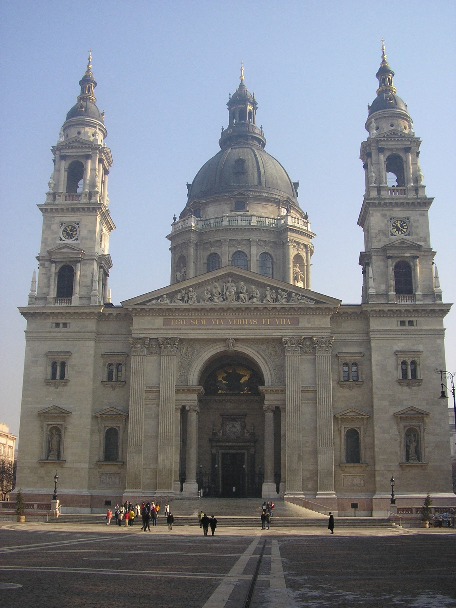 St. Stephen Basilica. בזיליקת אישטוון הקדוש בבודפשט